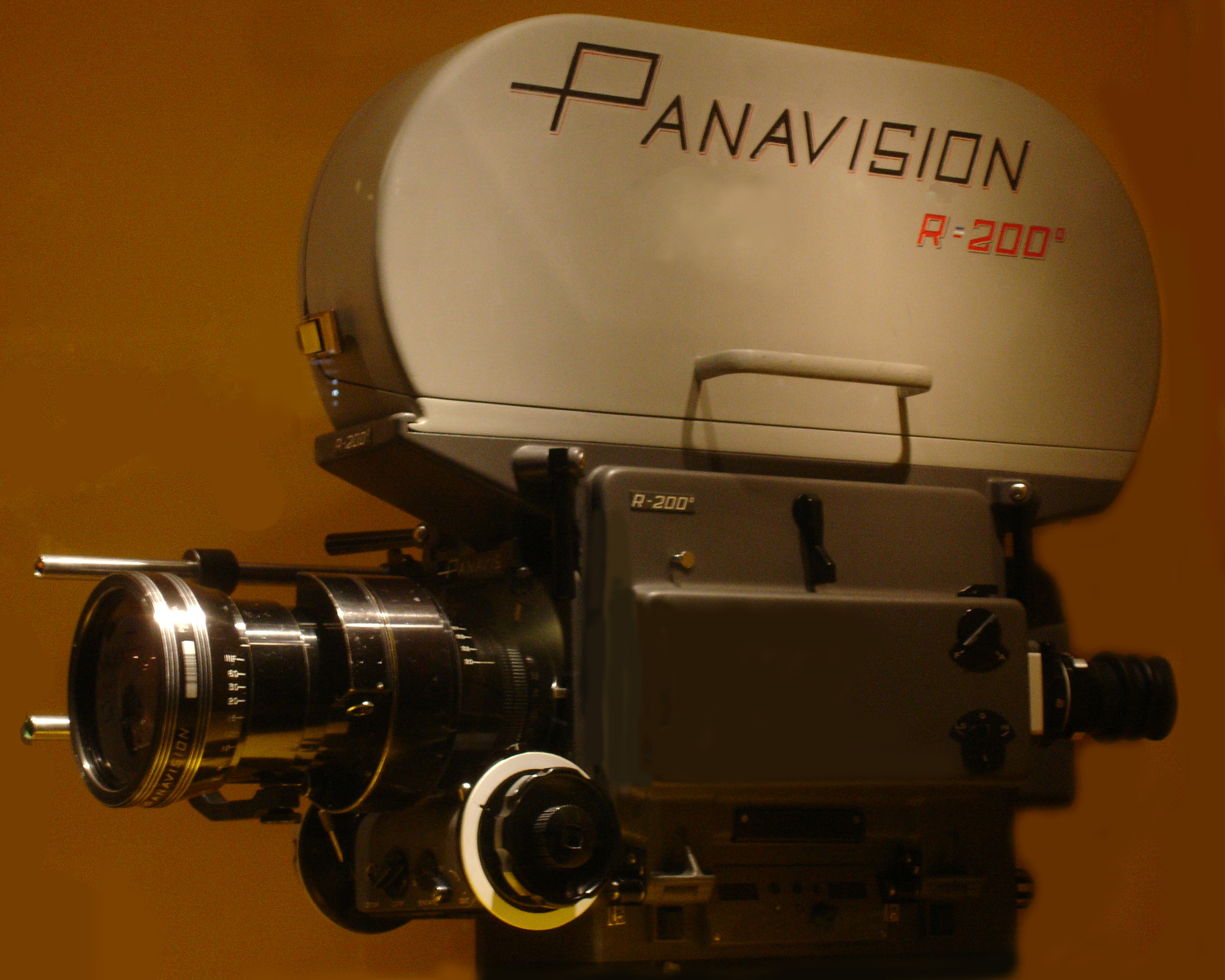 Caméra Super Panavision Silent Reflex fin années 1960